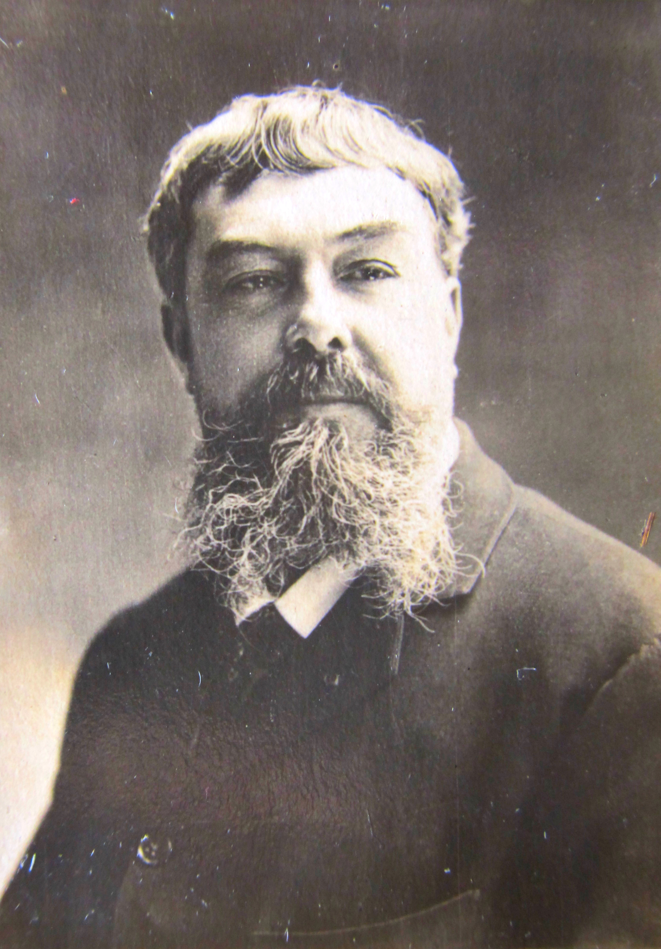 Théophile (fils) Poilpot (French, 1848-1915). Album 38x24,5 cartonnage éditeur, 1906, 2e collection Félix Potin 510 Célébrités Contemporaines. 4x7.5 cm.